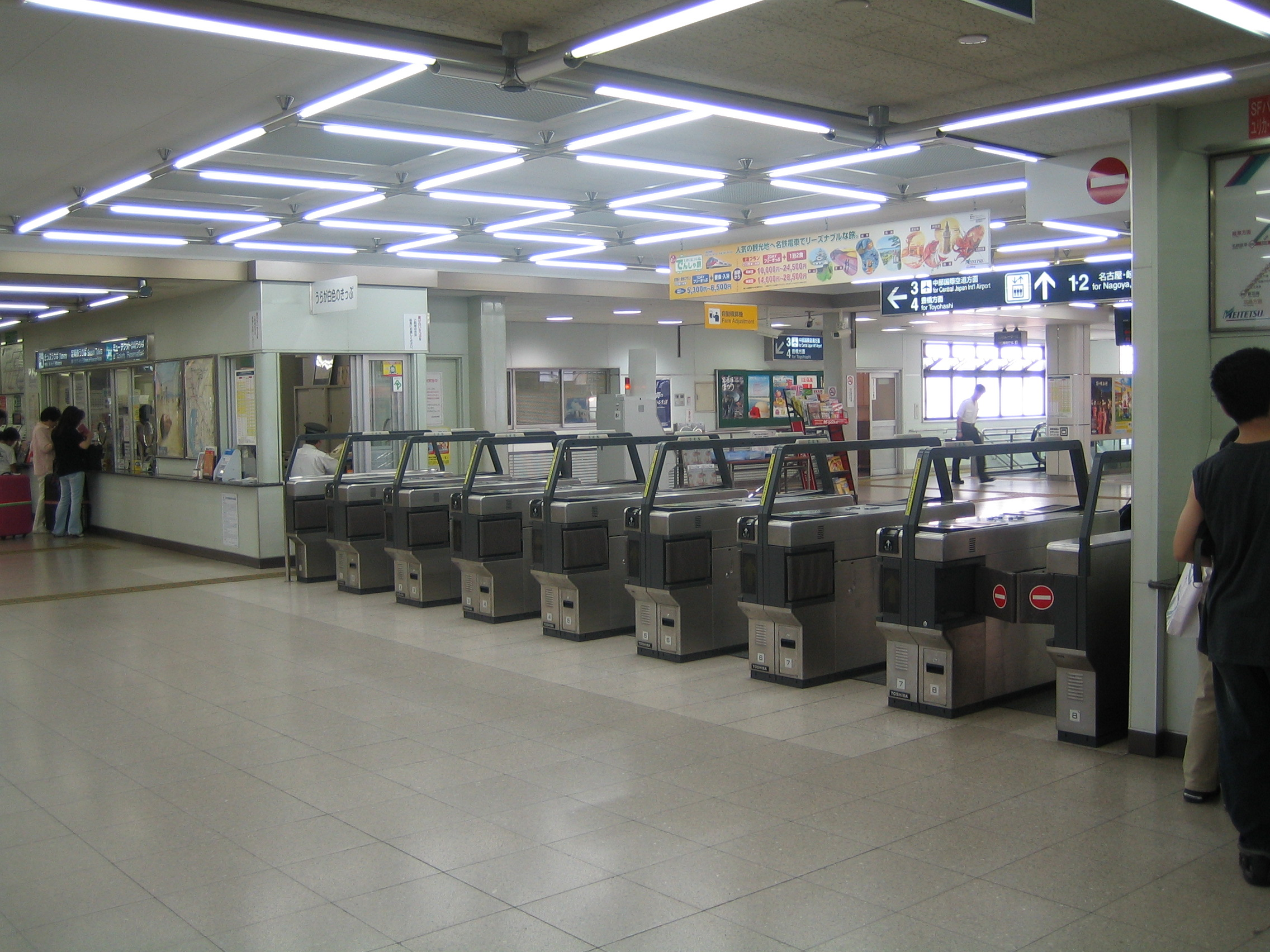 Jingu-mae Sta. (神宮前駅), at Atsuta-ku, Nagoya|Atsuta-ku, Nagoya Aichi, Japan